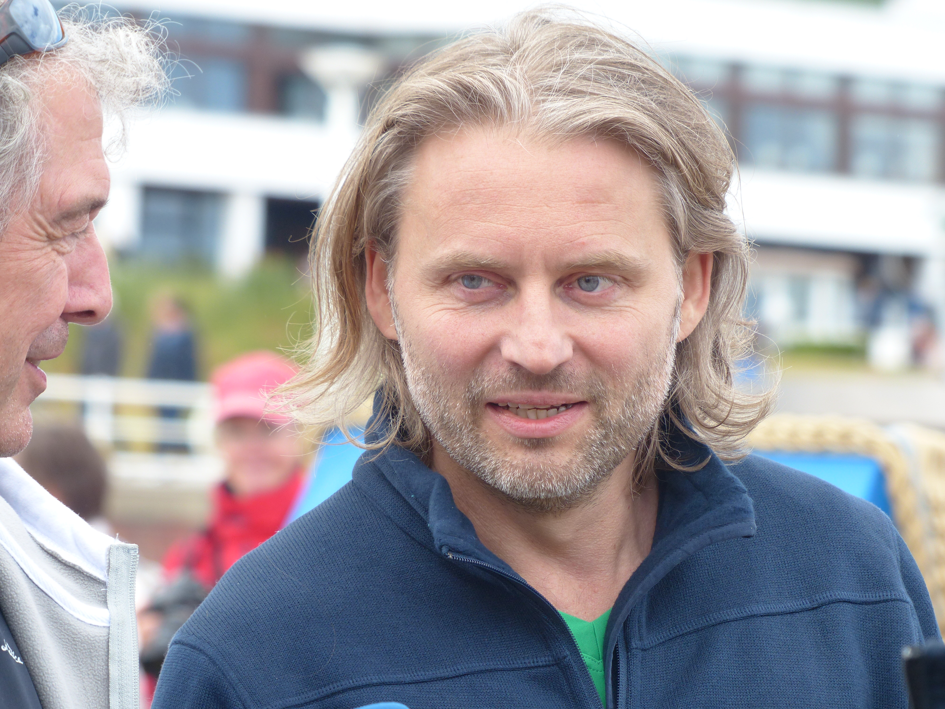 Erich Altenkopf, Beachvolleyball-Starcup 2014